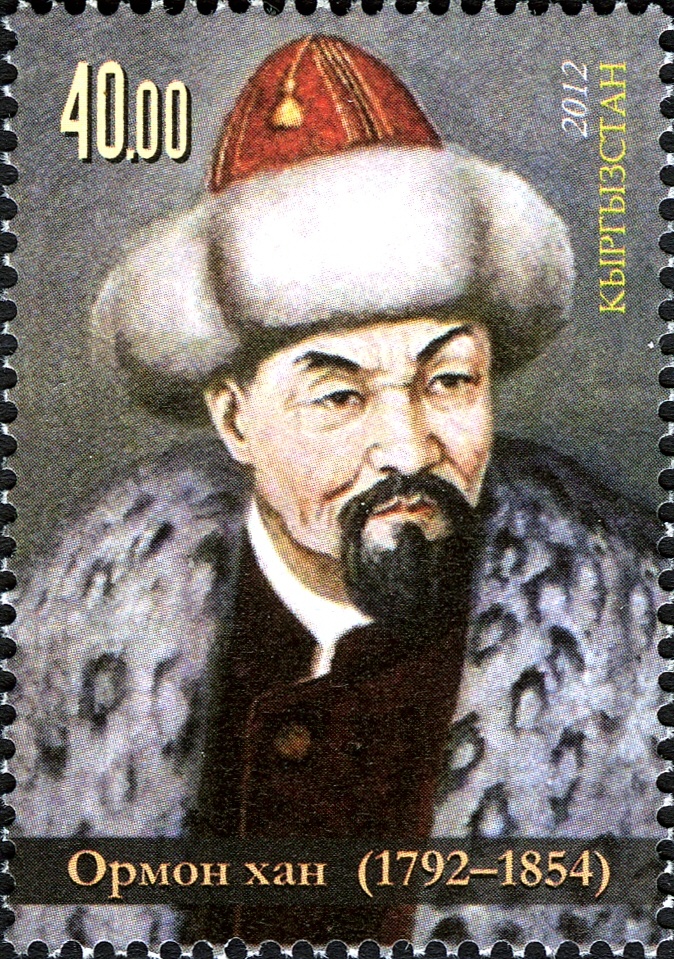 Кыргызча: Ормон-хан